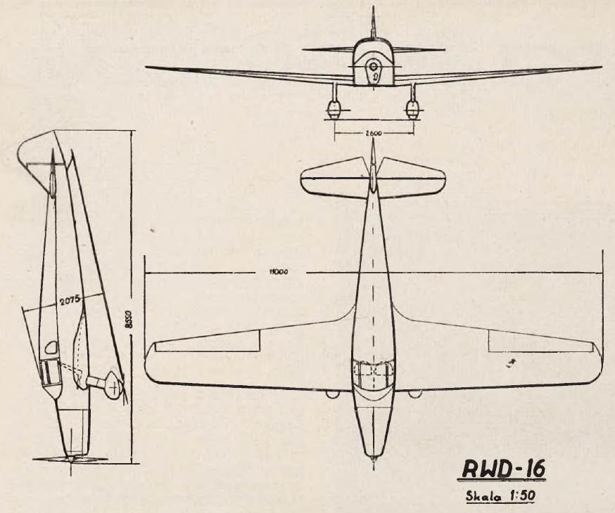 RWD-16 rzuty